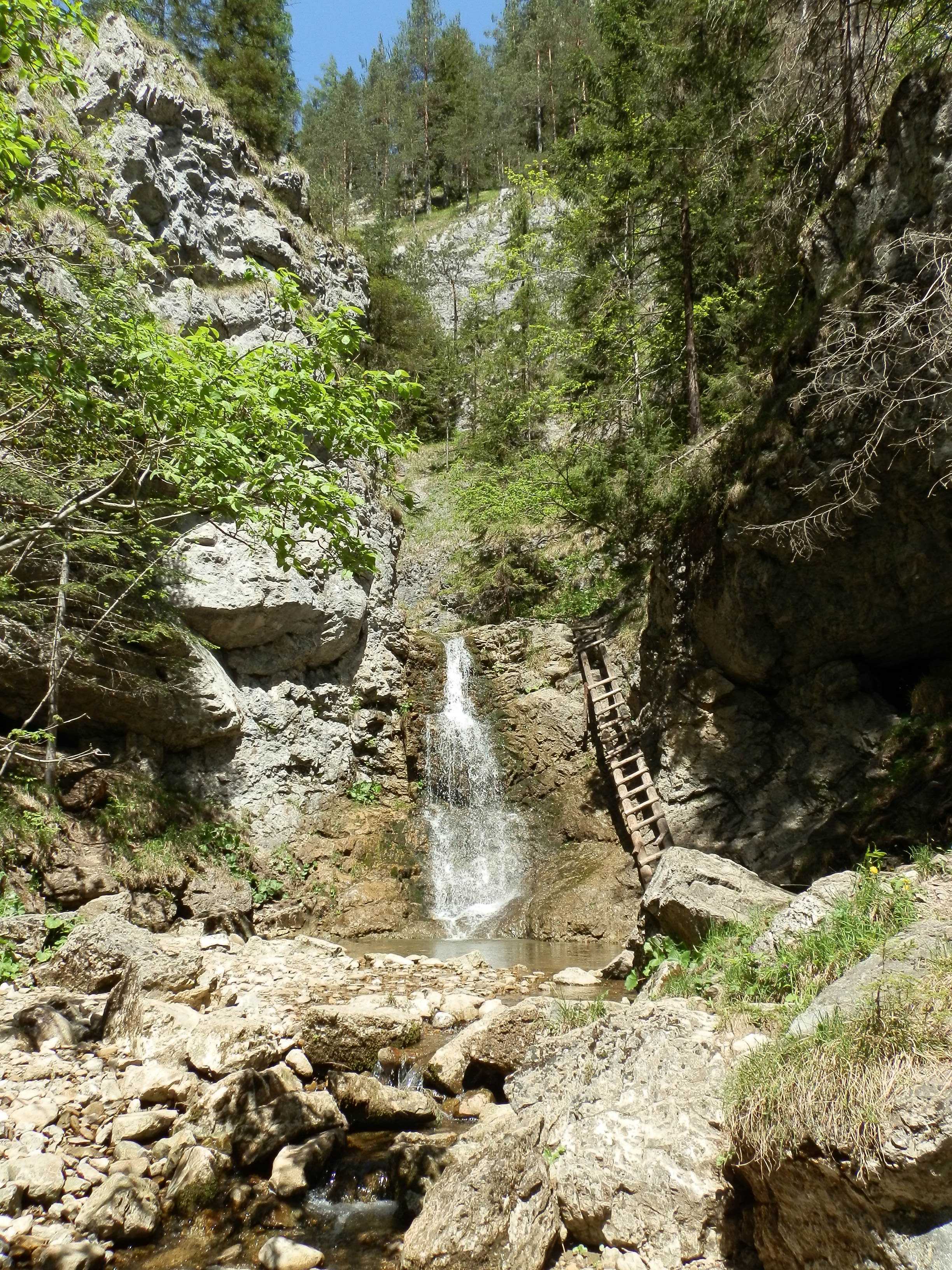 Ráztocký vodopád